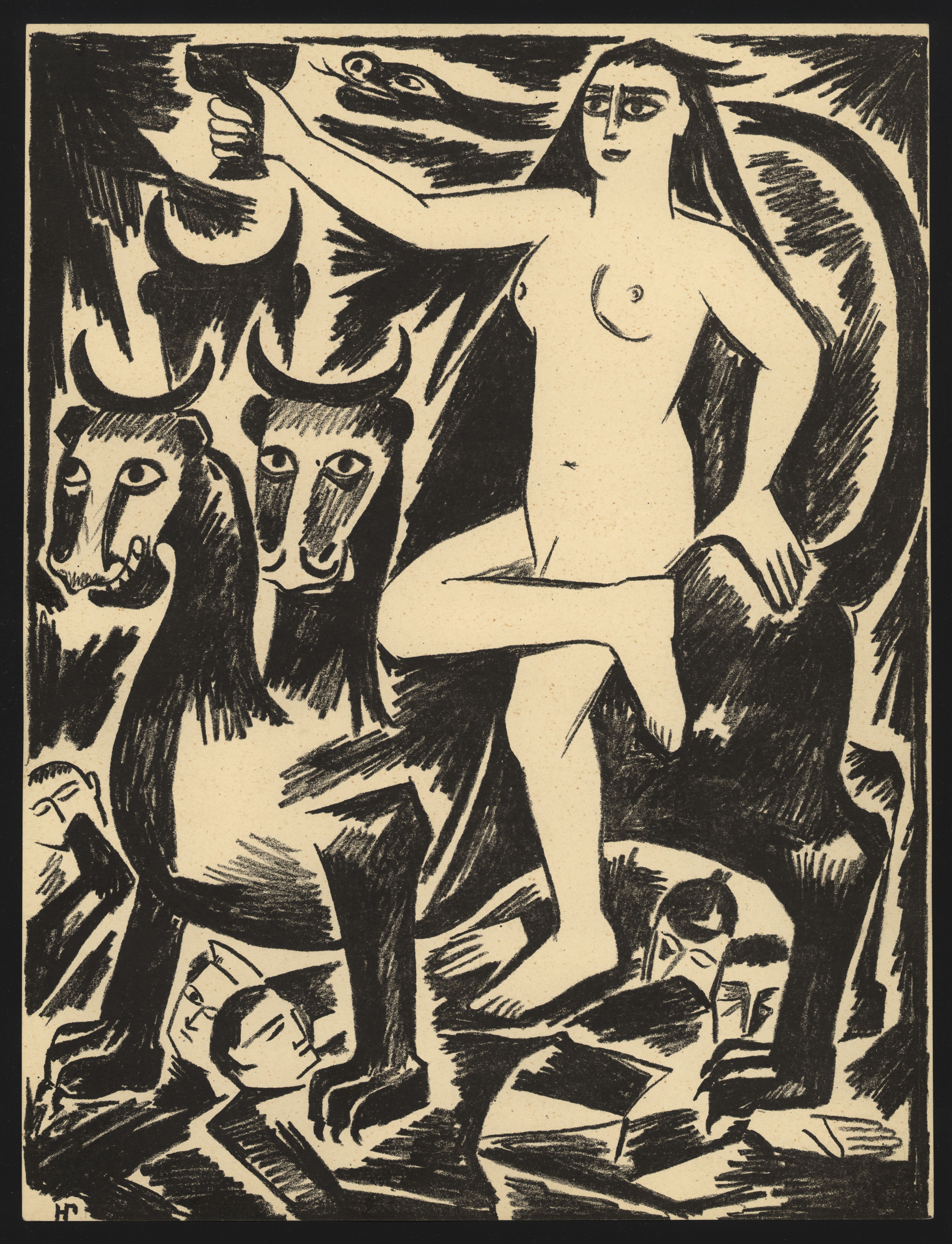 Дева на звере